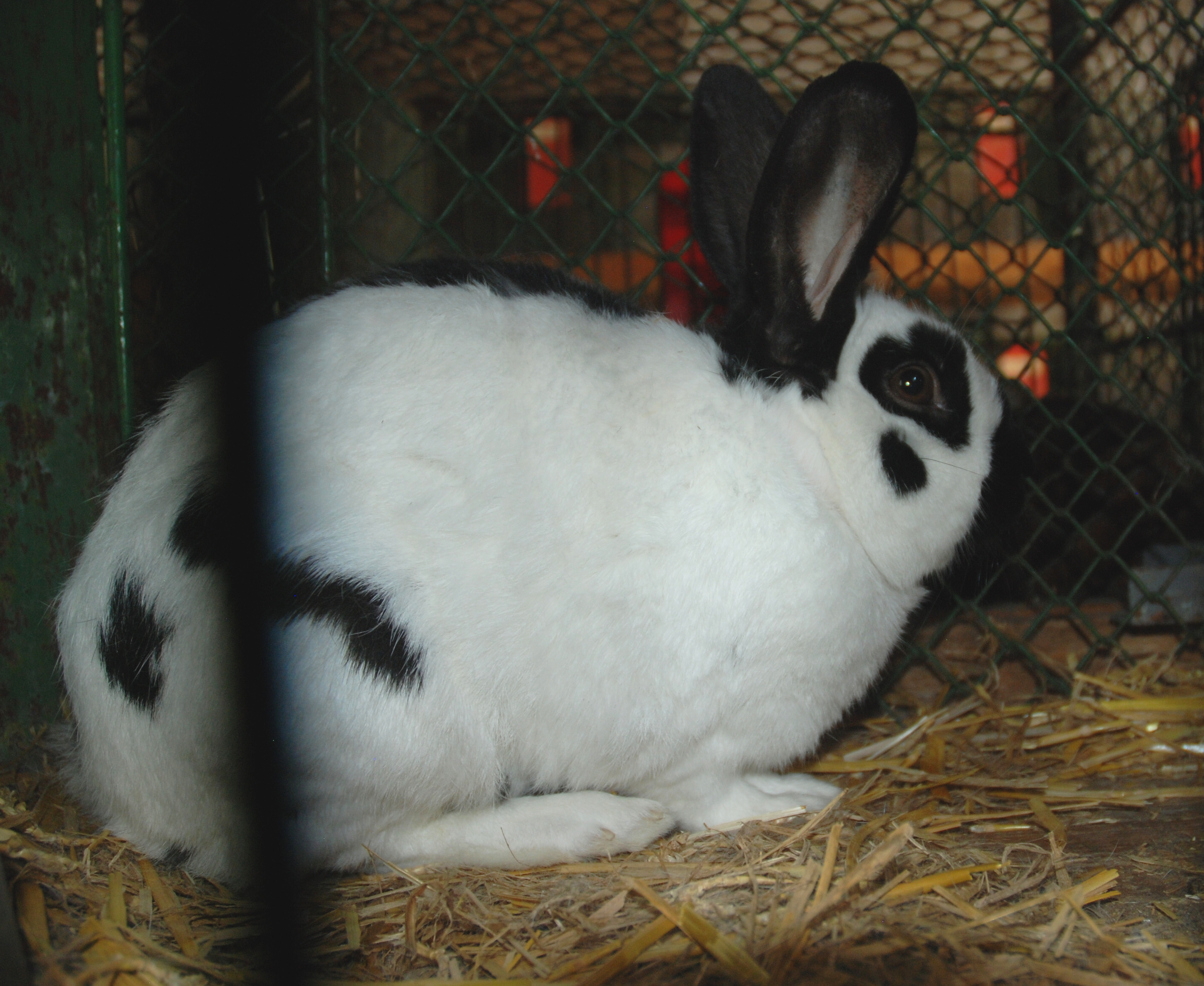 český strakáč černý